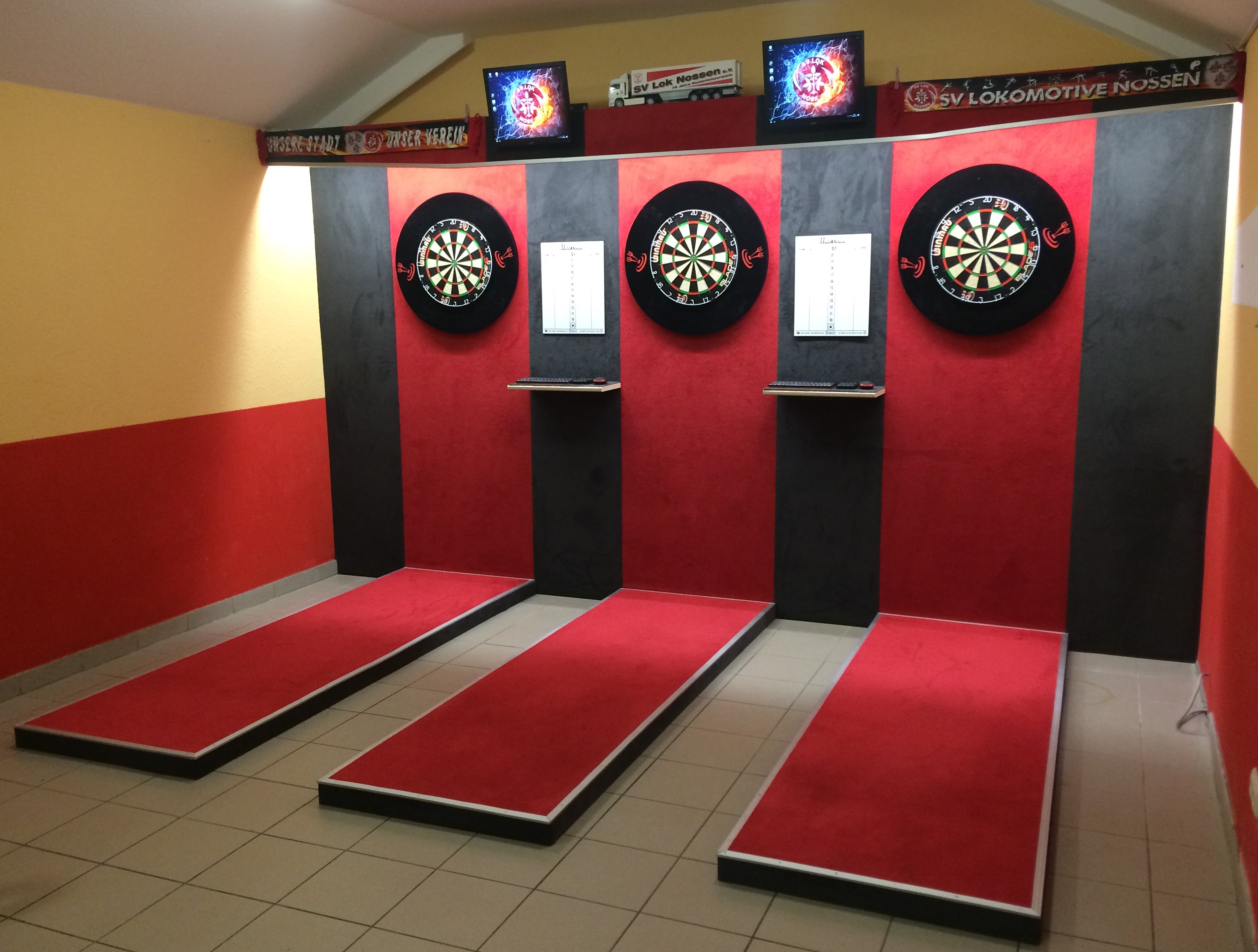 Neuerrichtete Dartanlage auf dem Muldentalsportplatz Nossen; Dezember 2017